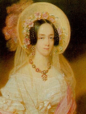 Erzherzogin Maria Beatrix von Österreich-Este (1824-1906), Tochter von Herzog Franz IV von Modena und von Princessin Maria Beatrice von Savoyen, Frau von Don Juan (III) Carlos Maria Isidro de Borbón, Graf von Montizón.